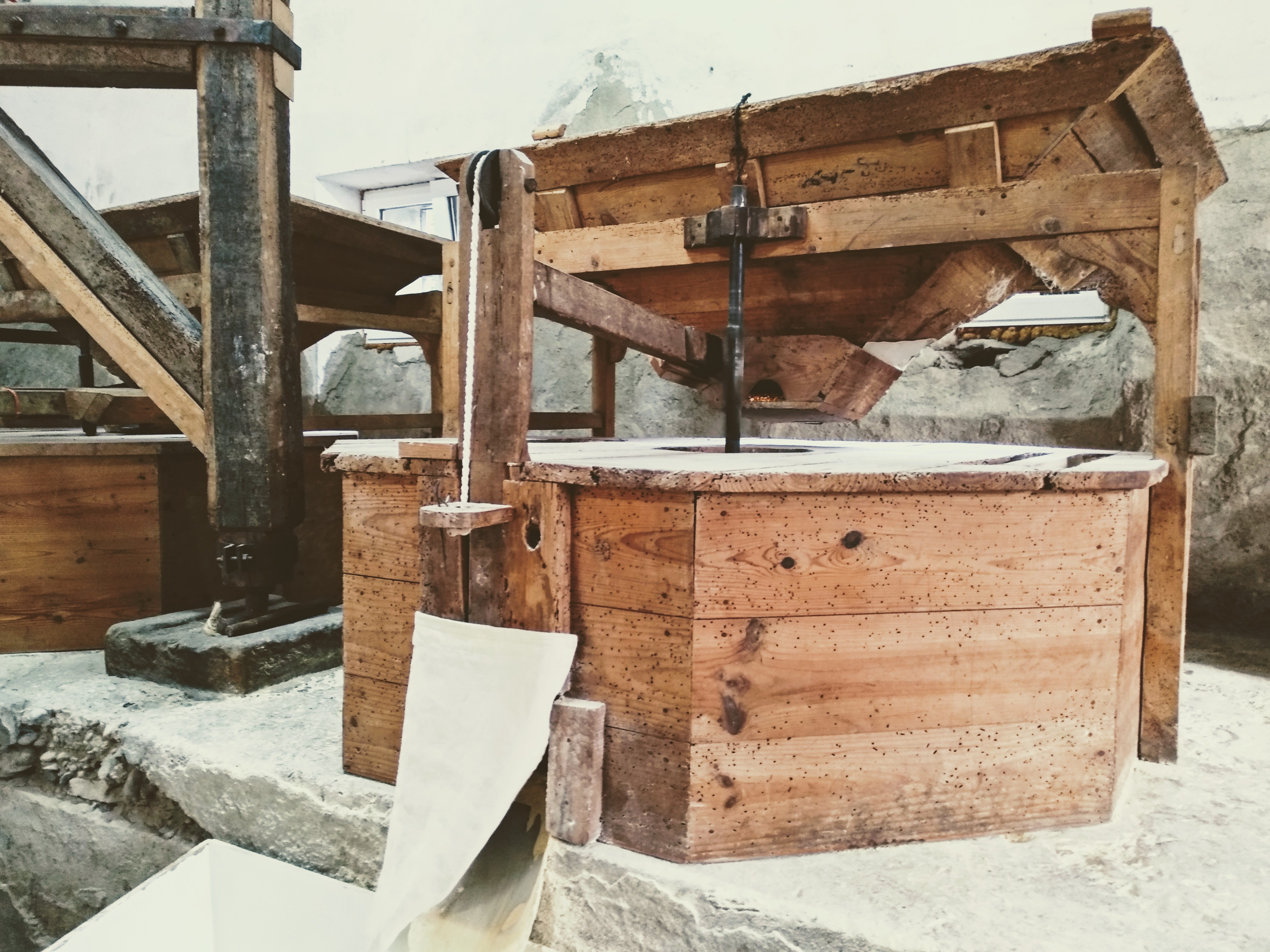 Yurrita Errotako makineria